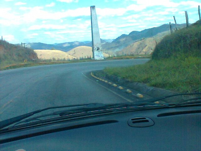 Thomaz Cardozo